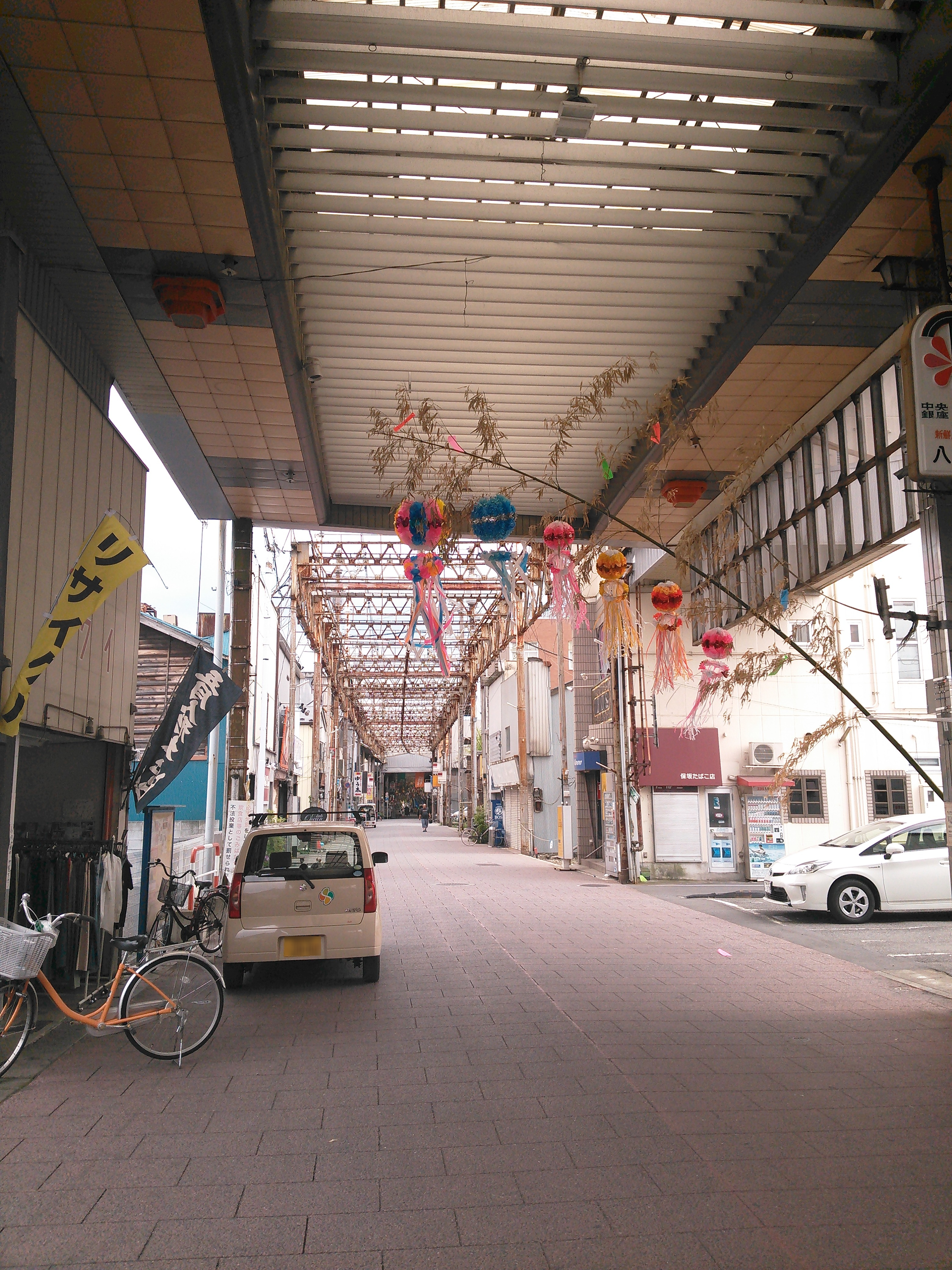 群馬県高崎市、高崎中央銀座商店街。平成26年豪雪で損壊したアーケード